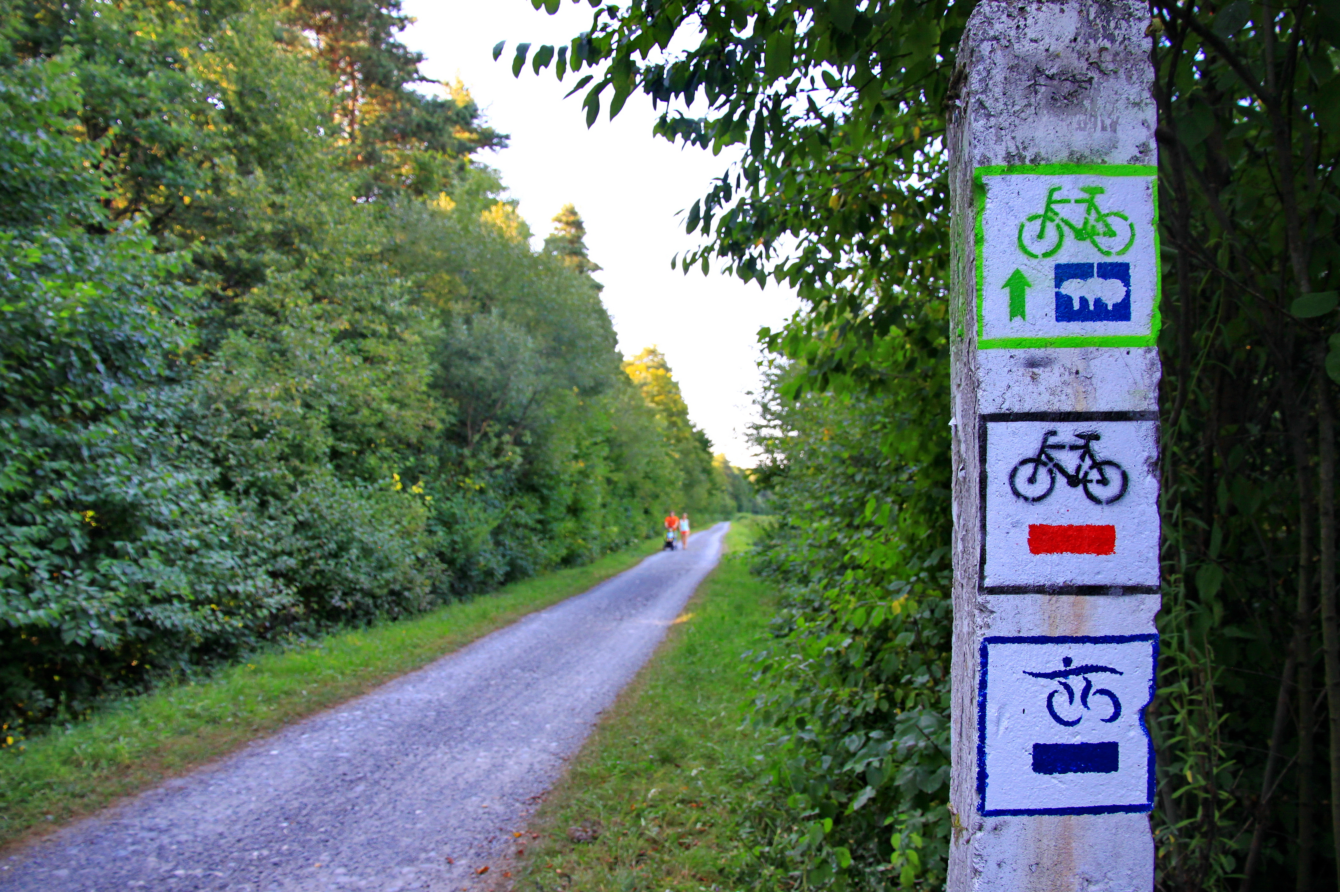 Malowania tras rowerowych w Ustroniu-Nierodzimiu: 1. Międzynarodowego Szlaku Rowerowego Kraków-Morawy-Wiedeń, 2. Czerwonej trasy rowerowej nr 24, 3. Wiślanej Trasy Rowerowej